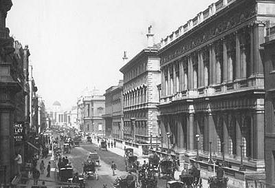 Pall Mall mit dem Carlton Club Fotografie von James Valentine (1815-1880)